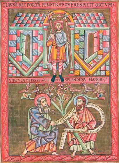 Tree of Jesse, Vyšehrad Codex, folio 4v; vyobrazení biblického panovníka v bráně, pravděpodobně Vratislava II.